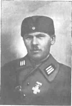 Андрій Долуд: Андрій Долуд